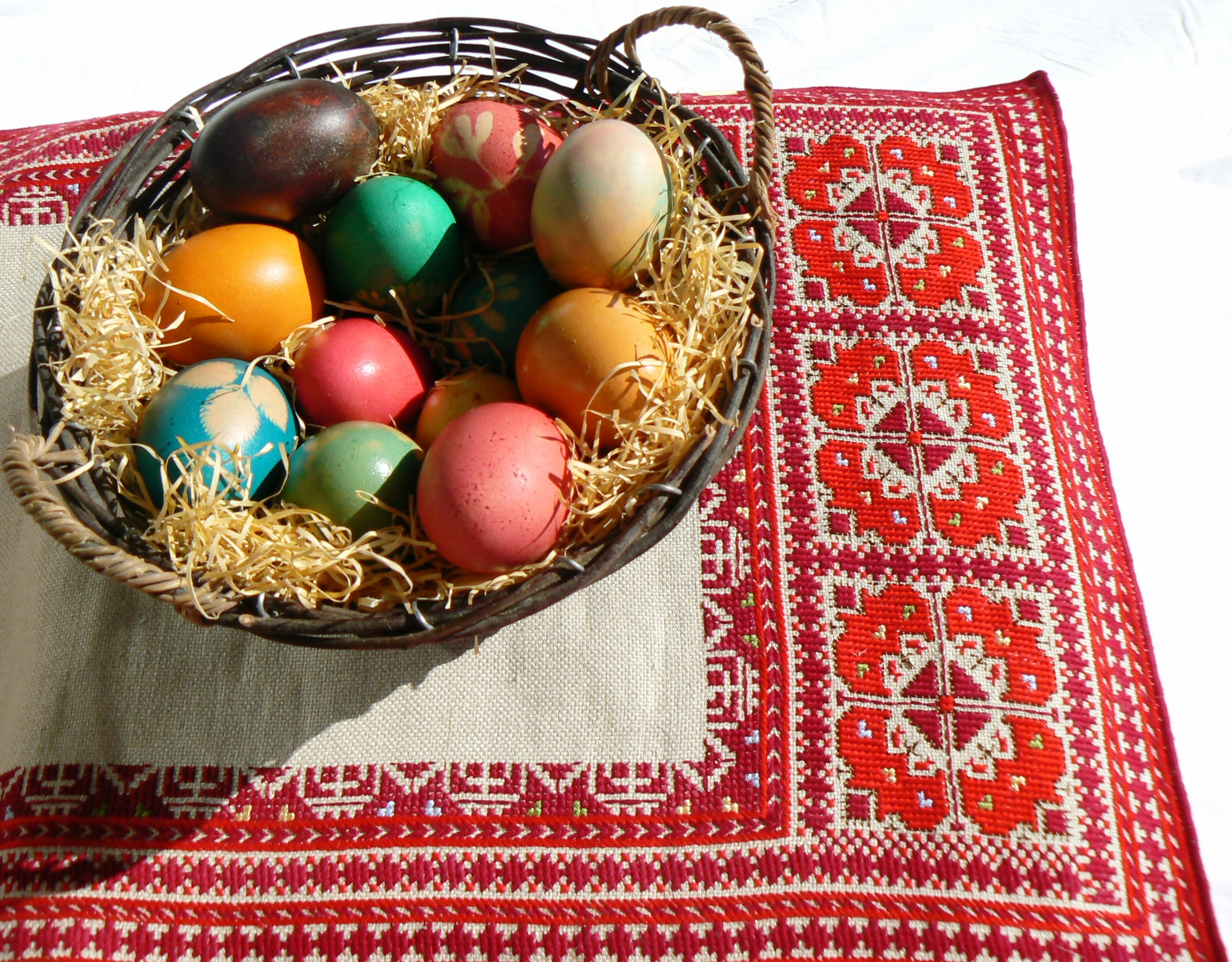 Easter eggs in basket, on a bulgarian embroidery tablecloth. Великденски яйца в панер, на покривка с българска бродерия.